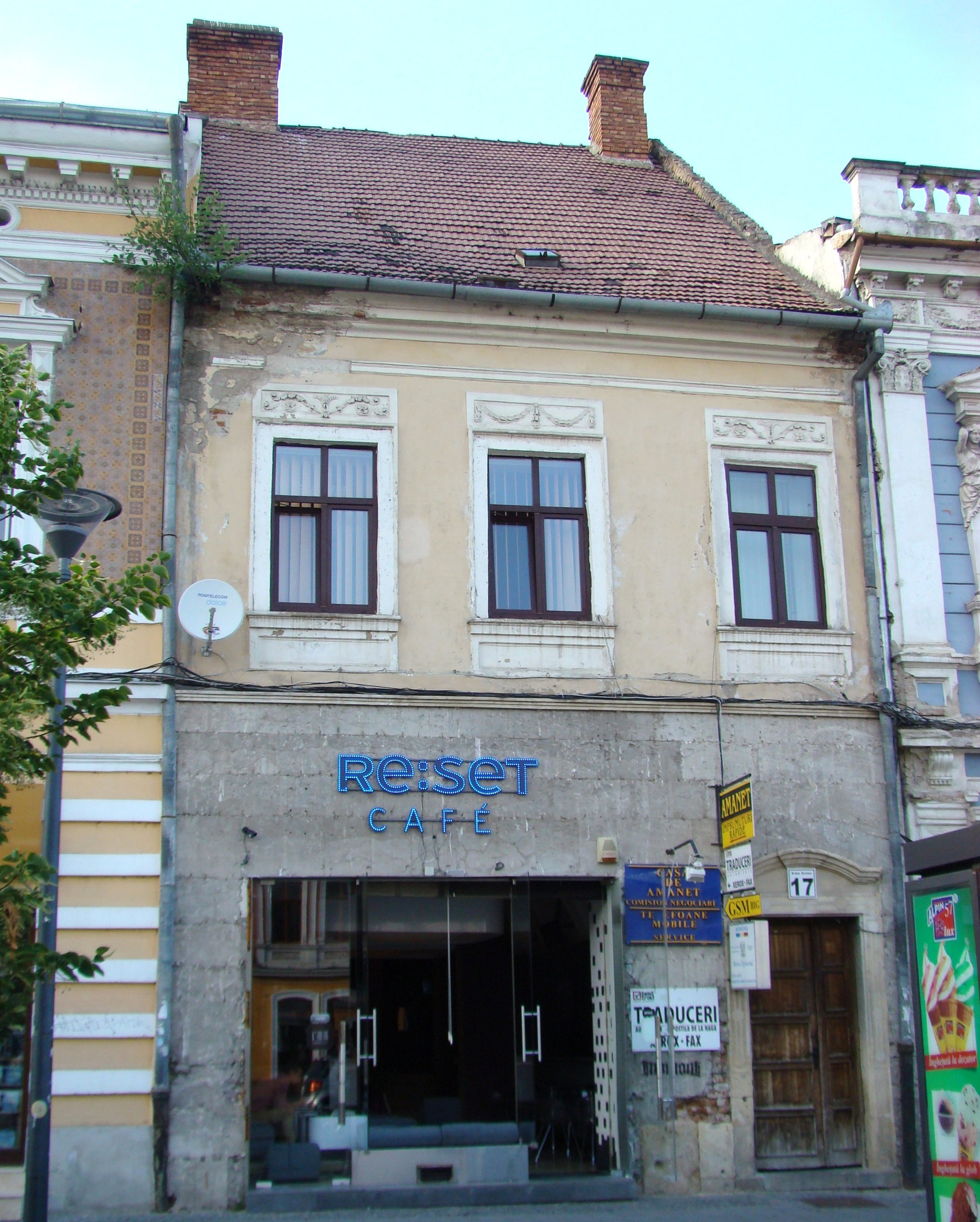 Clădire monument istoric, Bd.Eroilor, nr. 17